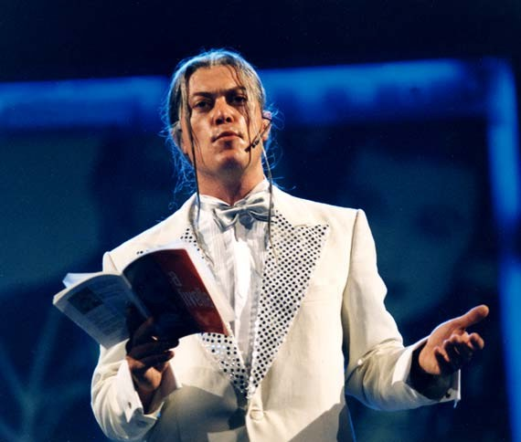 Personaggio di Corrado Guzzanti proveniente da usata su gentile concessione dello stesso (Ticket#2007081610016131)